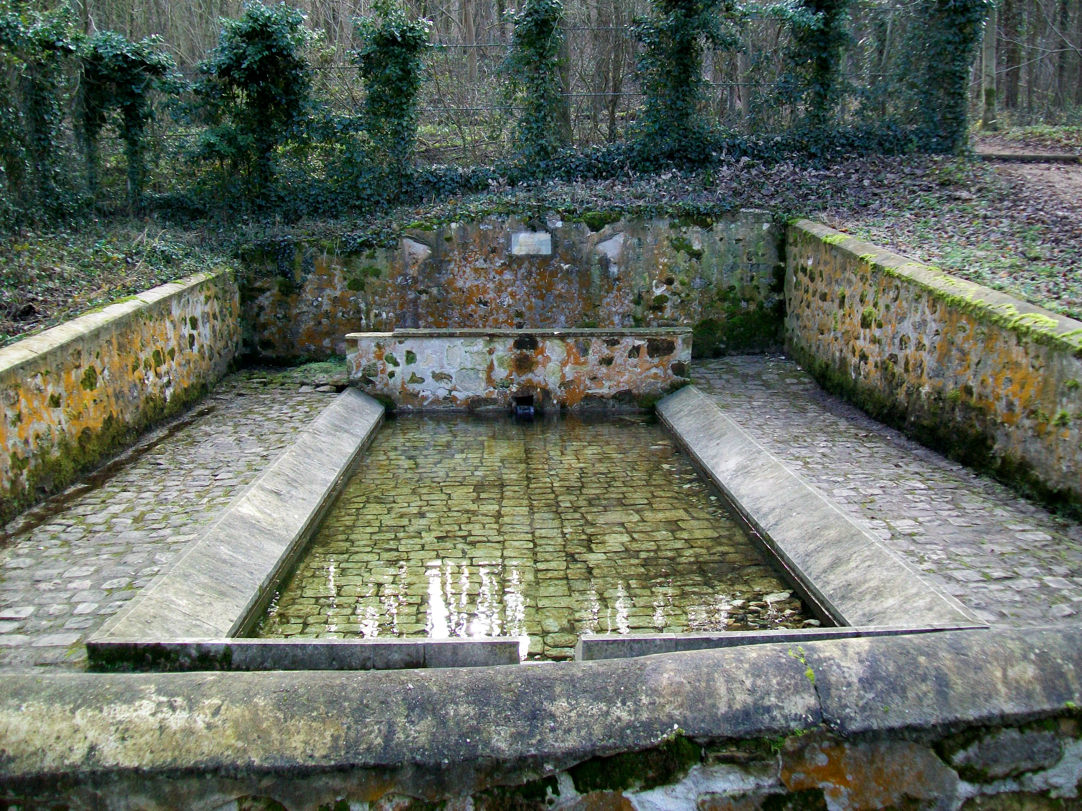 Lavoir de Roquemont ou de la Grande Fontaine à Luzarches (95). Le mur au premier plan n'est pas d'origine: l'espace au milieu était ouvert, et sous les pignons des toits à gauche et à droite, se trouvait des murs avec des portes.